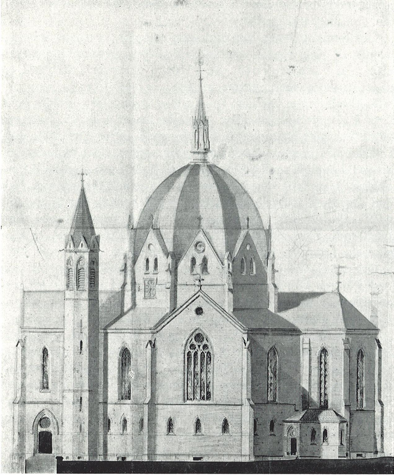 Eksteriør_syd